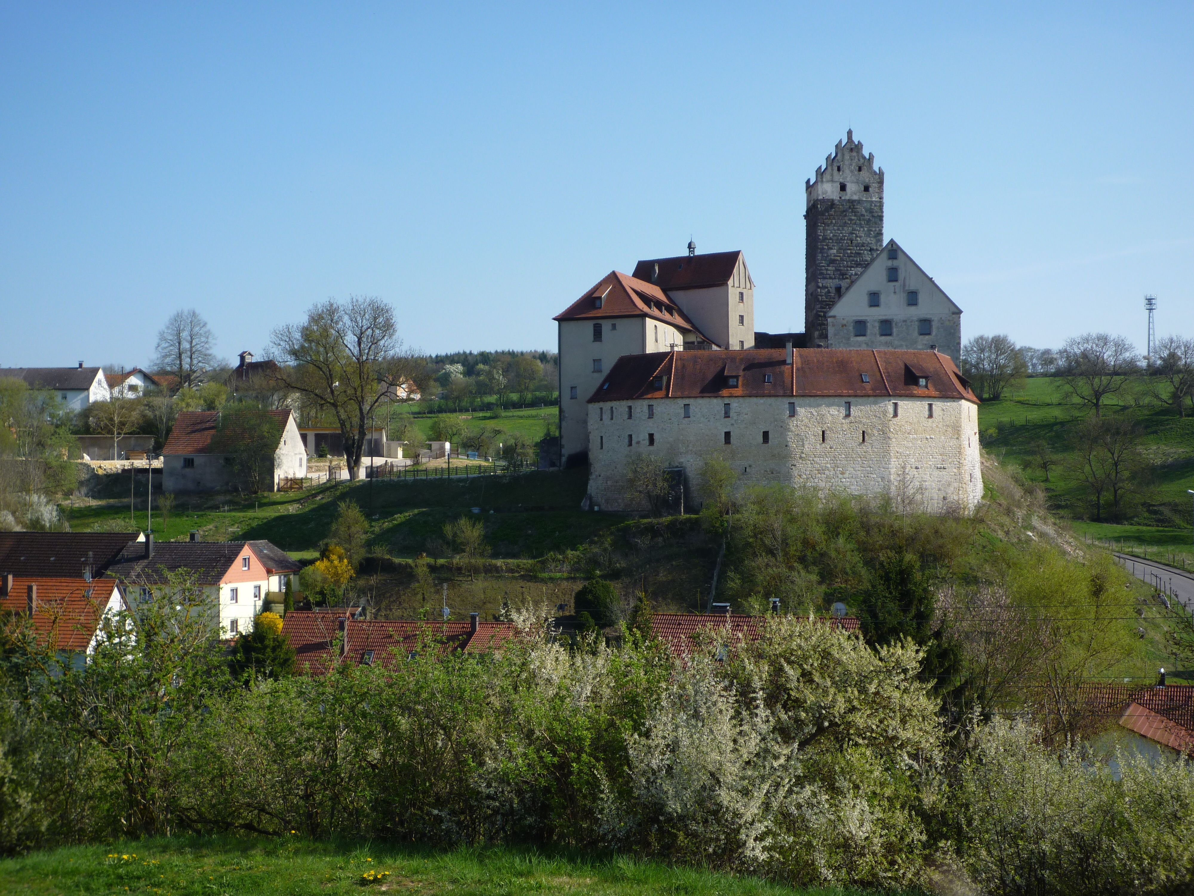 Dischingen - Stauferburg Katzenstein